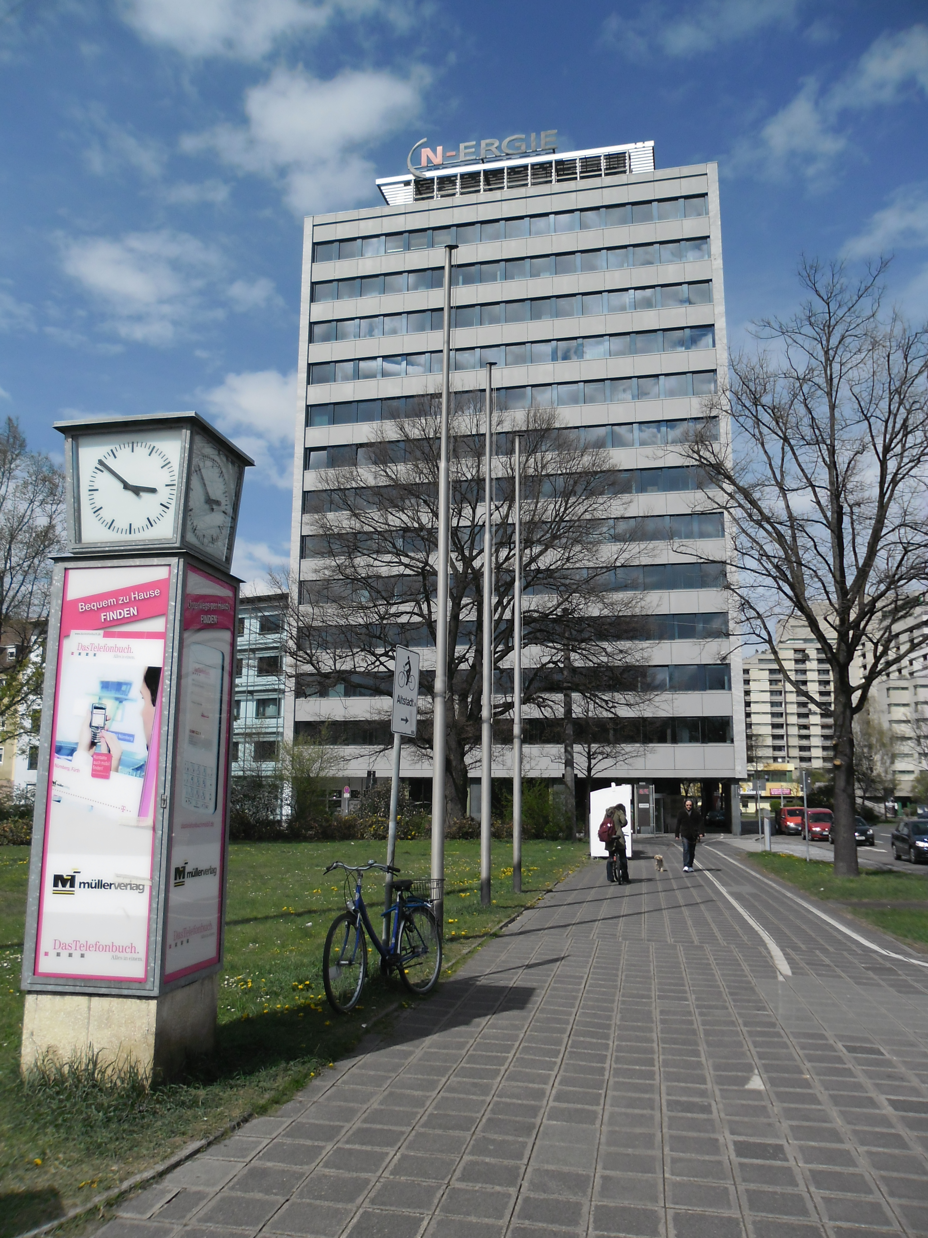 Hochhaus an der Ecke Hainstraße/Wilhelm-Spaeth-Straße im Norden des Platzes der Opfer des Faschismus